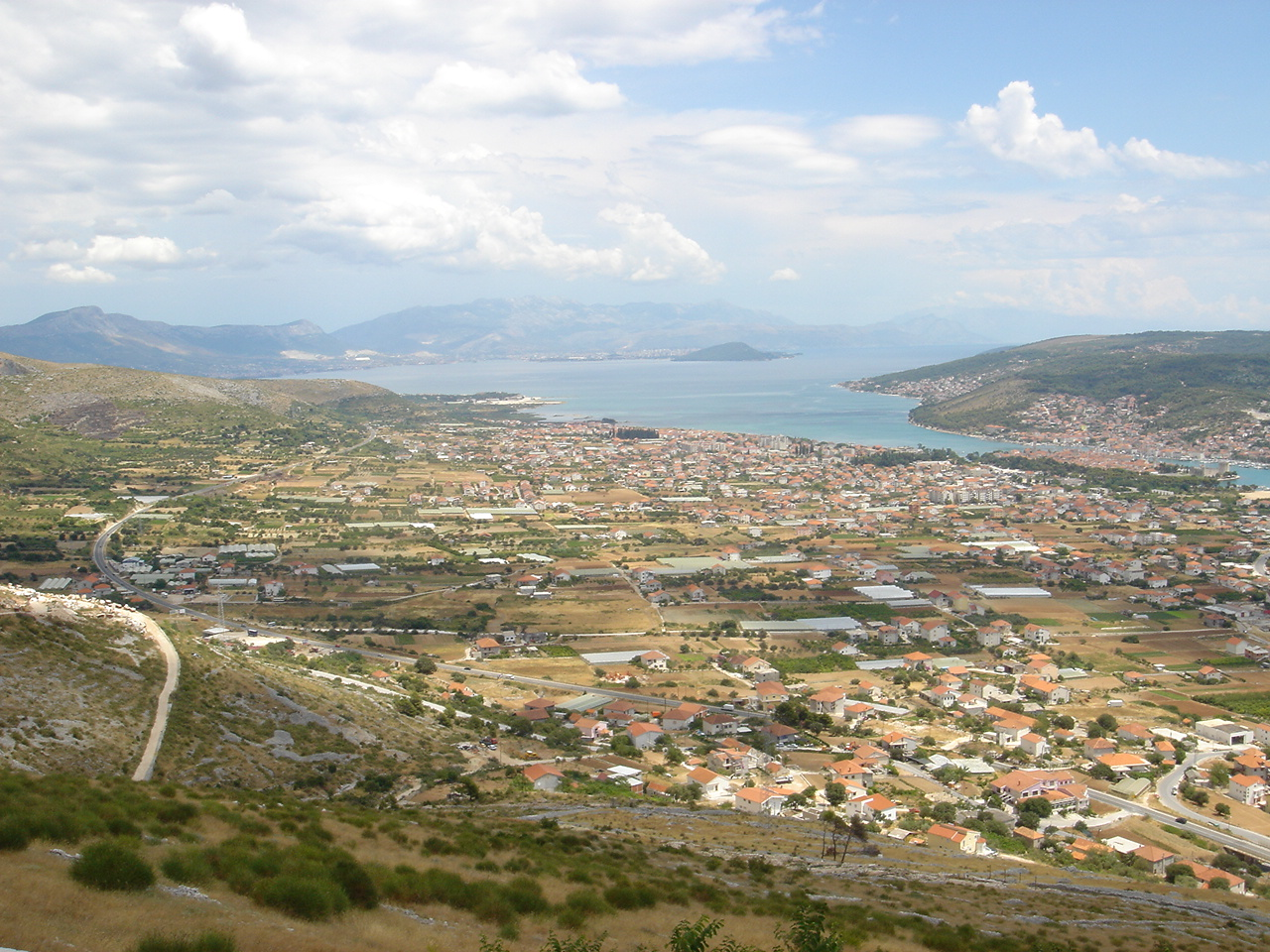 Trogir